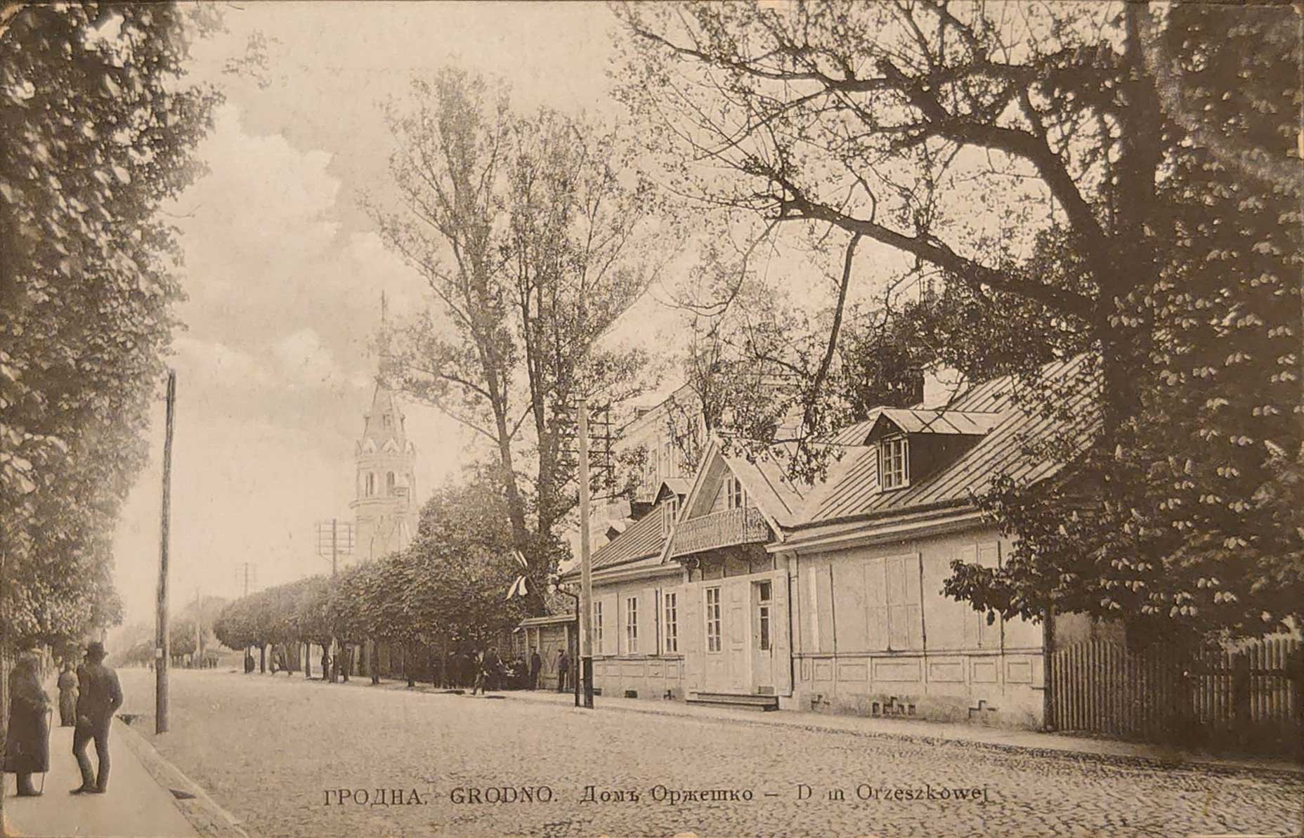 Беларуская (тарашкевіца): Горадня (Horadnia), дом Элізы Ажэшкі (Eliza Ažeška)